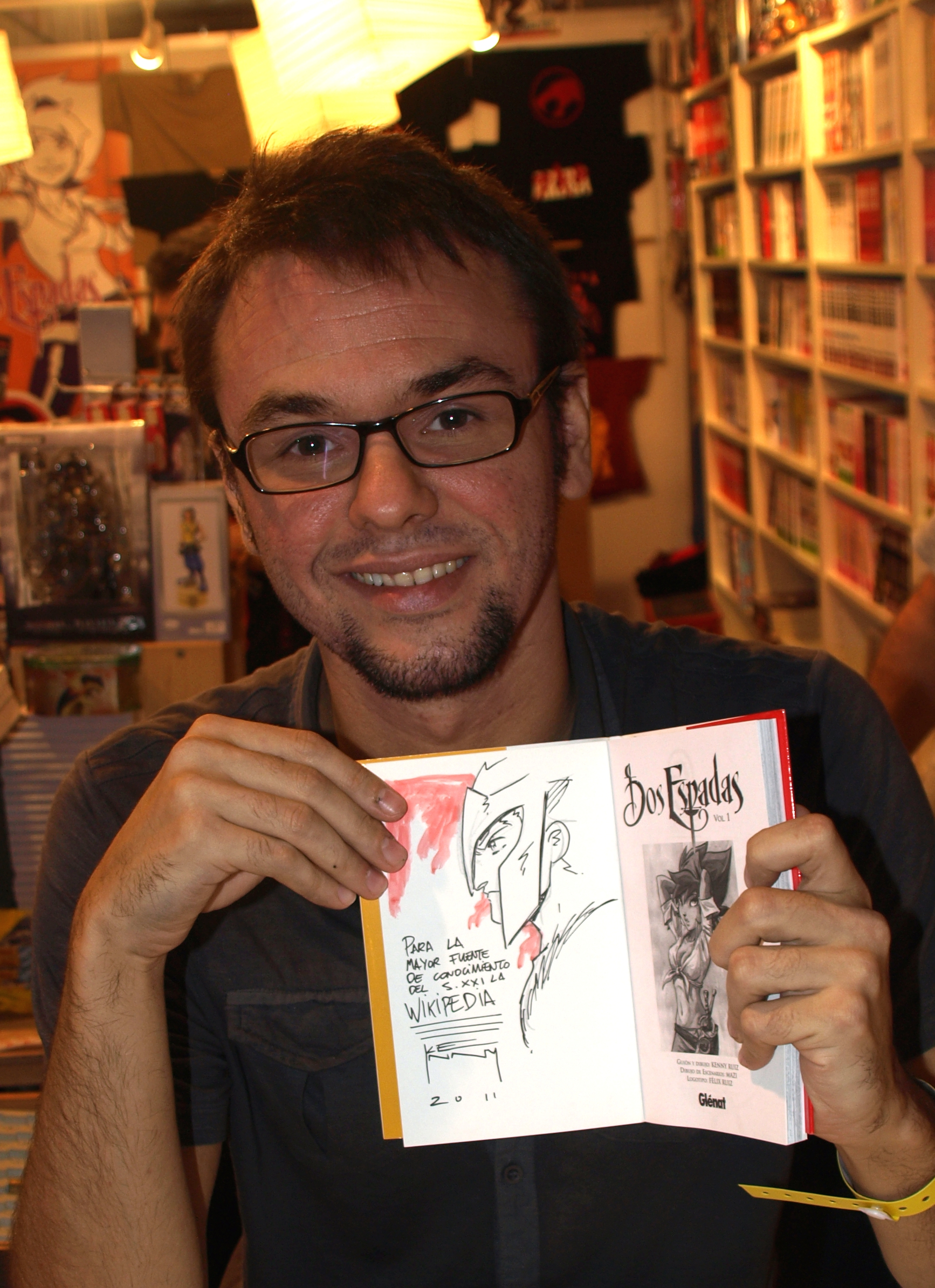 Kenny Ruiz (12 de noviembre de 1980, Alicante) es un historietista español.